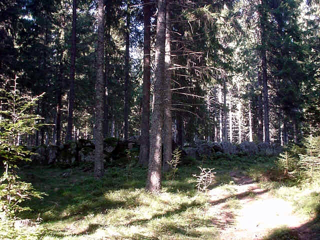 Steinkreise am Schluchsee: „Heidenmauer“ - Schluchsee - Baden-Württemberg - Deutschland